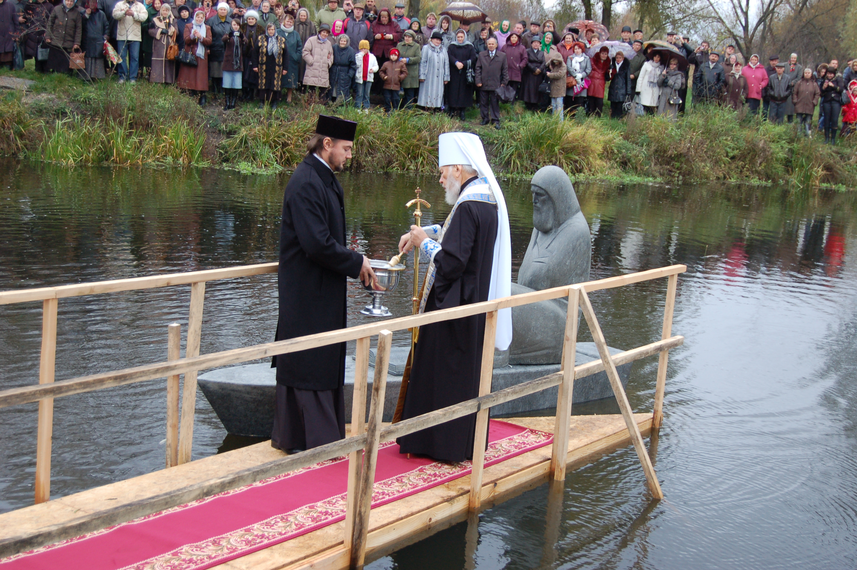 Митрополит Киевский и всея Украины (УПЦ МП) Владимир Сабодан освящает памятник архимандриту Киево-Печерской лавры Елисею Плетенецкому в "Замке Радомысль". Радомышль, 29 октября 2009 г.